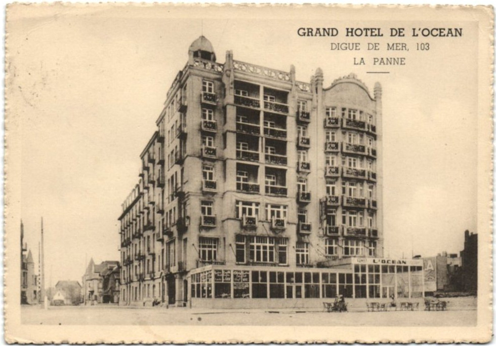 Le Grand Hôtel de l'Océan à La Panne (Belgique) vers 1906. Carte postale ancienne.